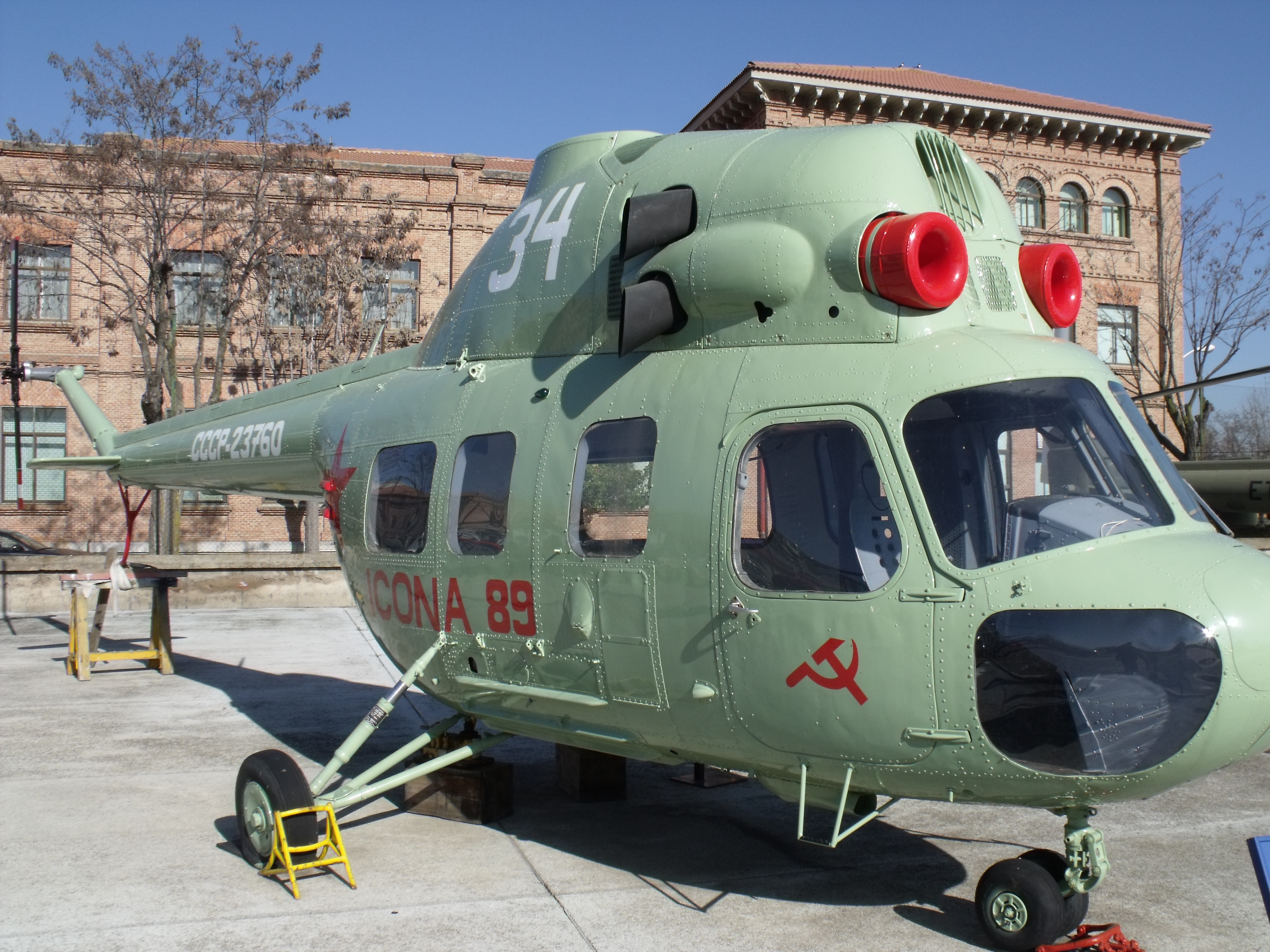 Mil Mi-2 que fue contratado por el ICONA (CCCP-23760). Museo del Aire de Cuatro Vientos (Madrid)